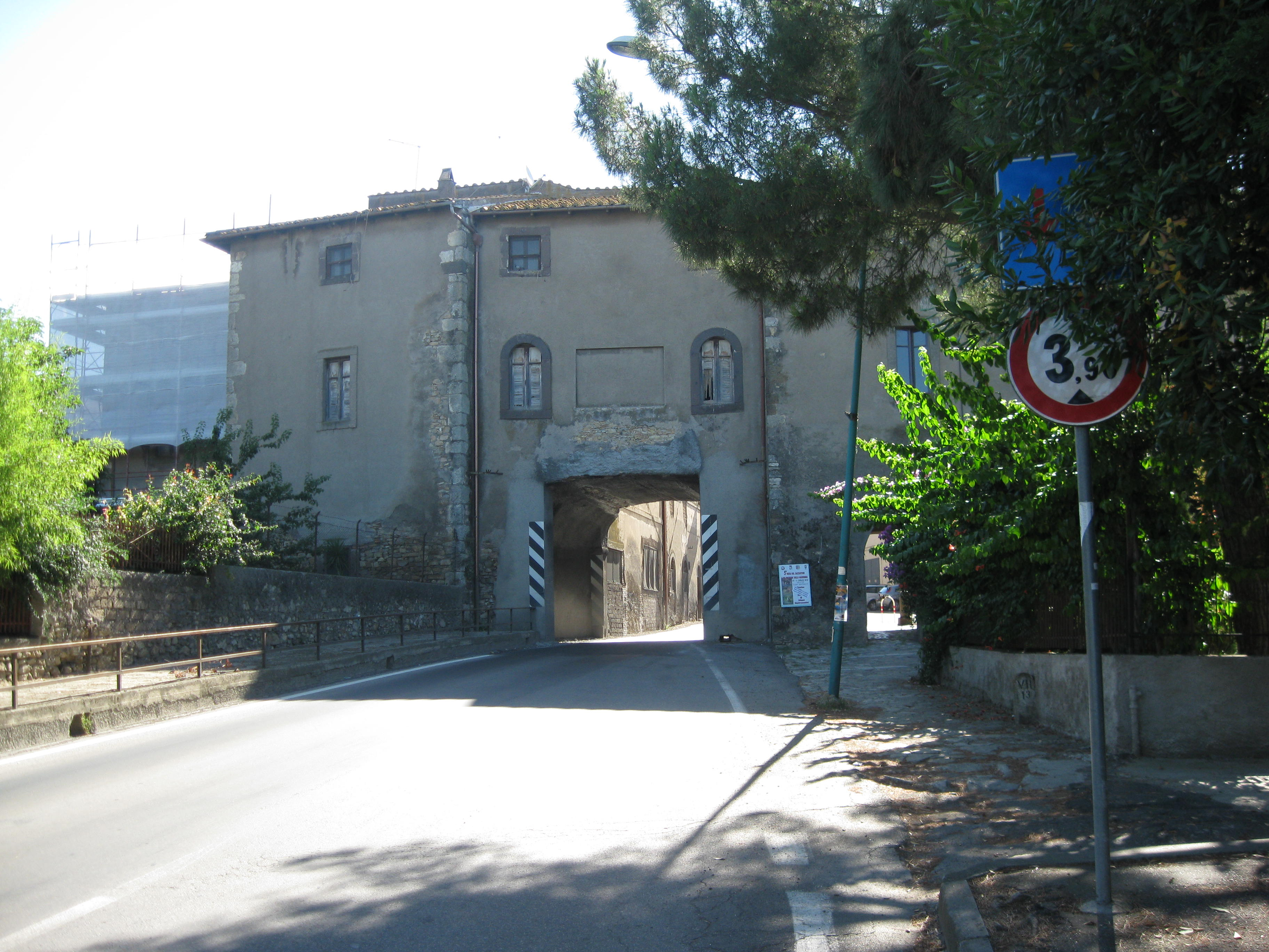 Entrata del paese.== Licenza ==